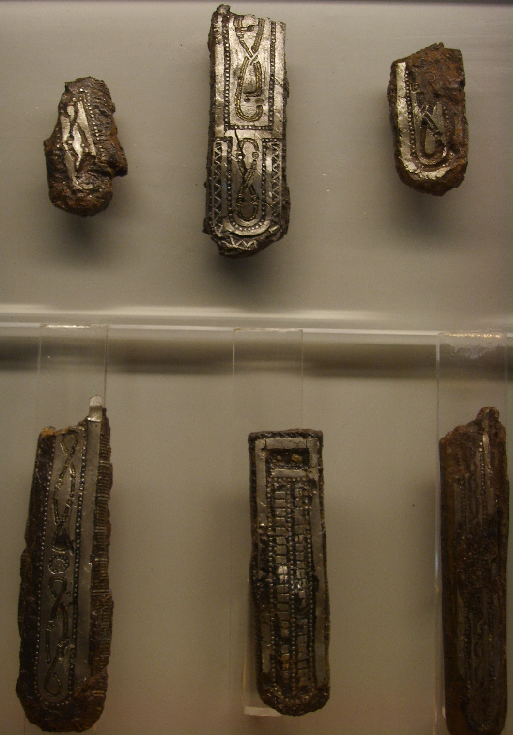 Guarnizioni con agemina in argento e ottone (dettaglio), opera di oreficeria longobarda, esposta nel Museo di Castelvecchio a Verona.